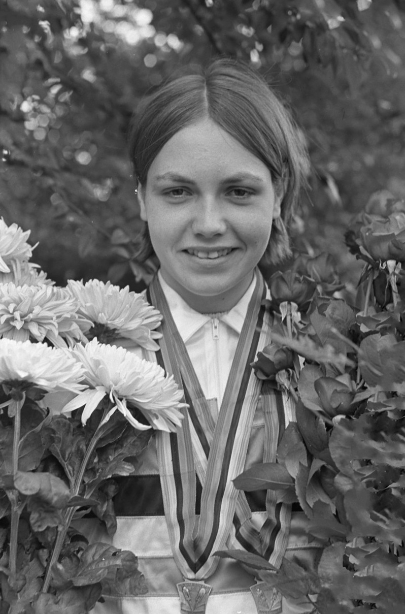 Keetie van Oosten-Hage